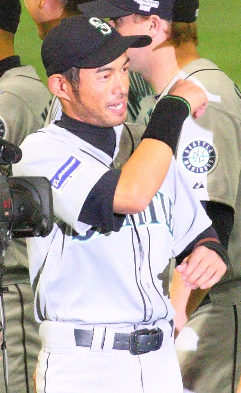 Ichiro Suzuki